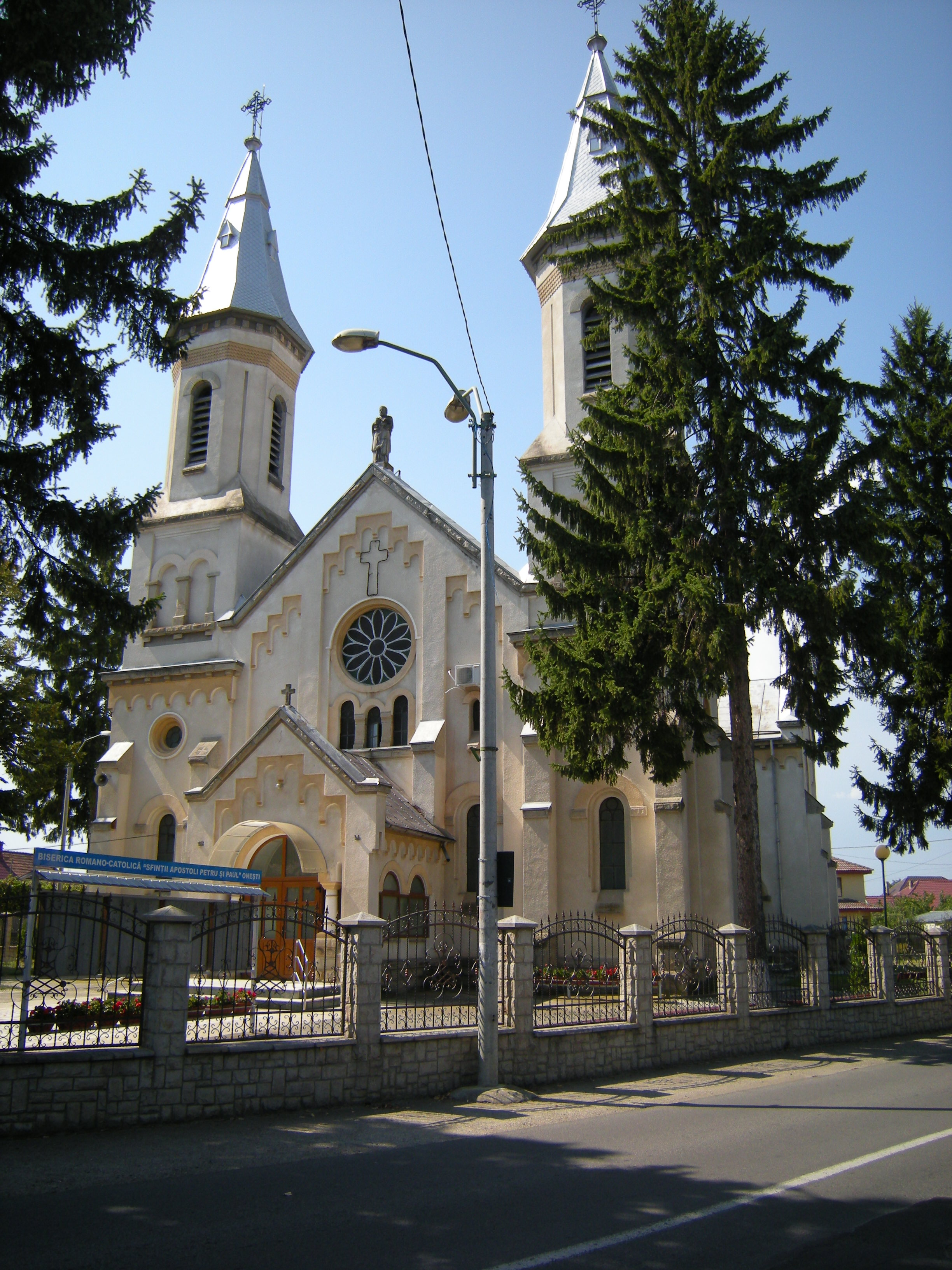 Biserica cu hramul „Sfinții Petru și Paul” din Onești, construită între 1920-1945.